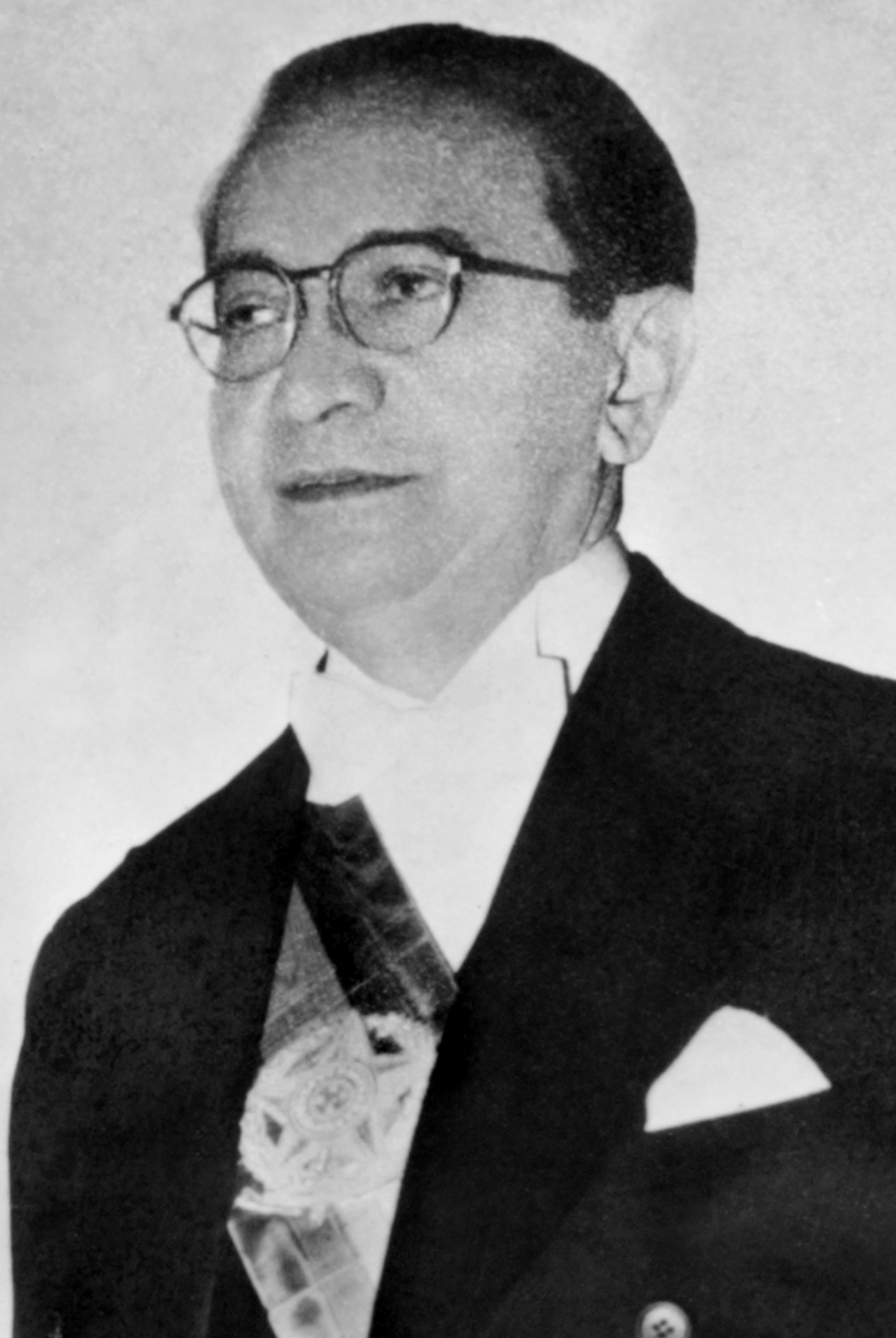 Foto oficial de Café Filho, presidente do Brasil entre 1954 e 1955.